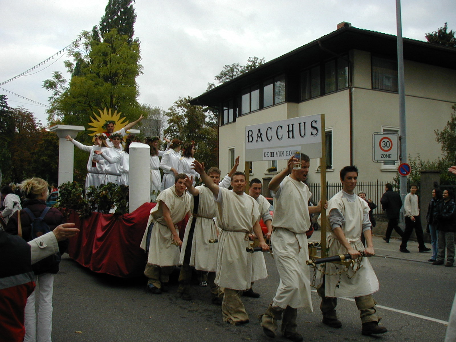 Zugnummer beim Neustadter Winzerfestzug